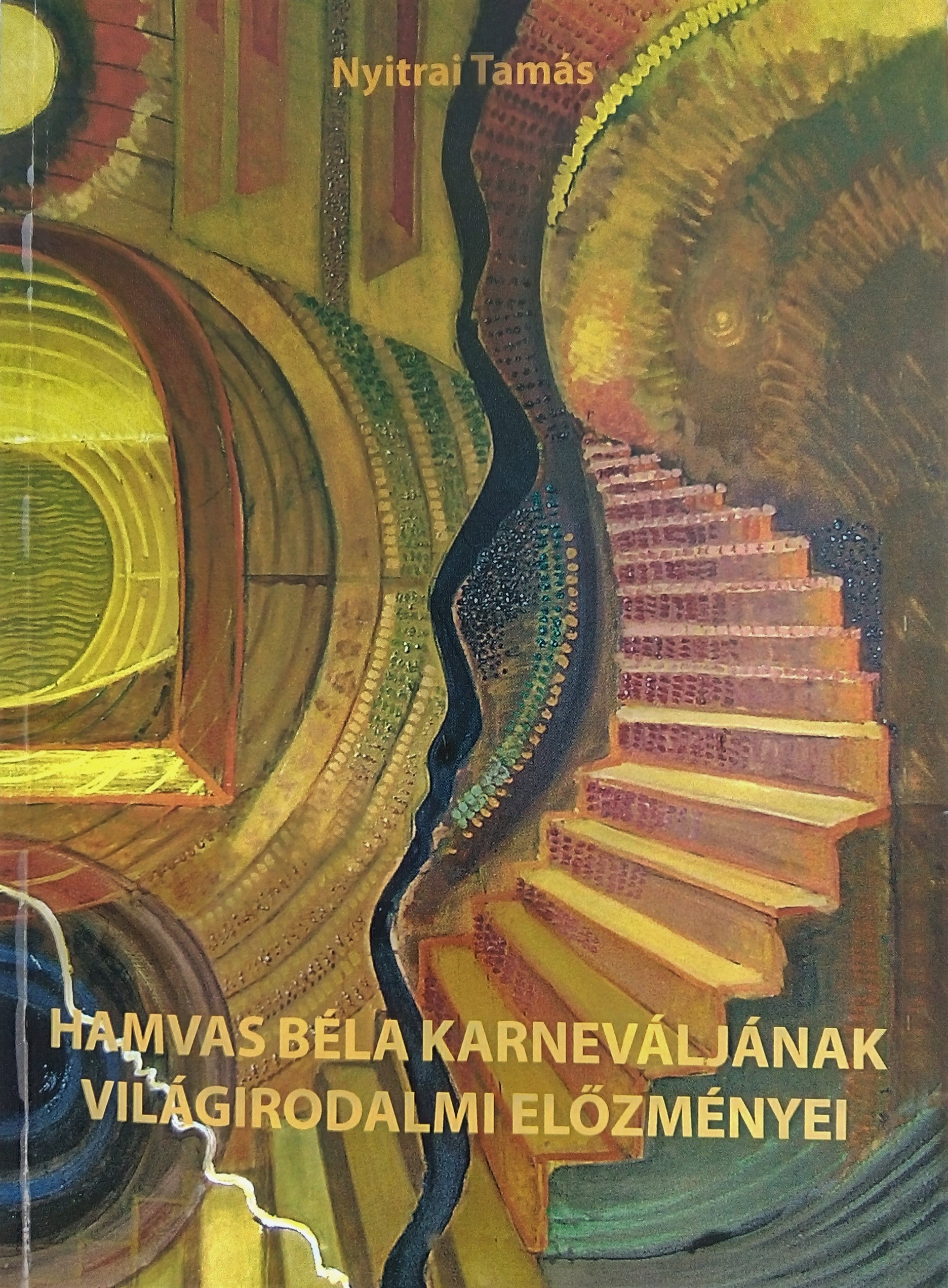 Nyitrai Tamás Hamvas Béla Karneváljának világirodalmi előzményei című könyvének borítója, Magánkiadás, 2019